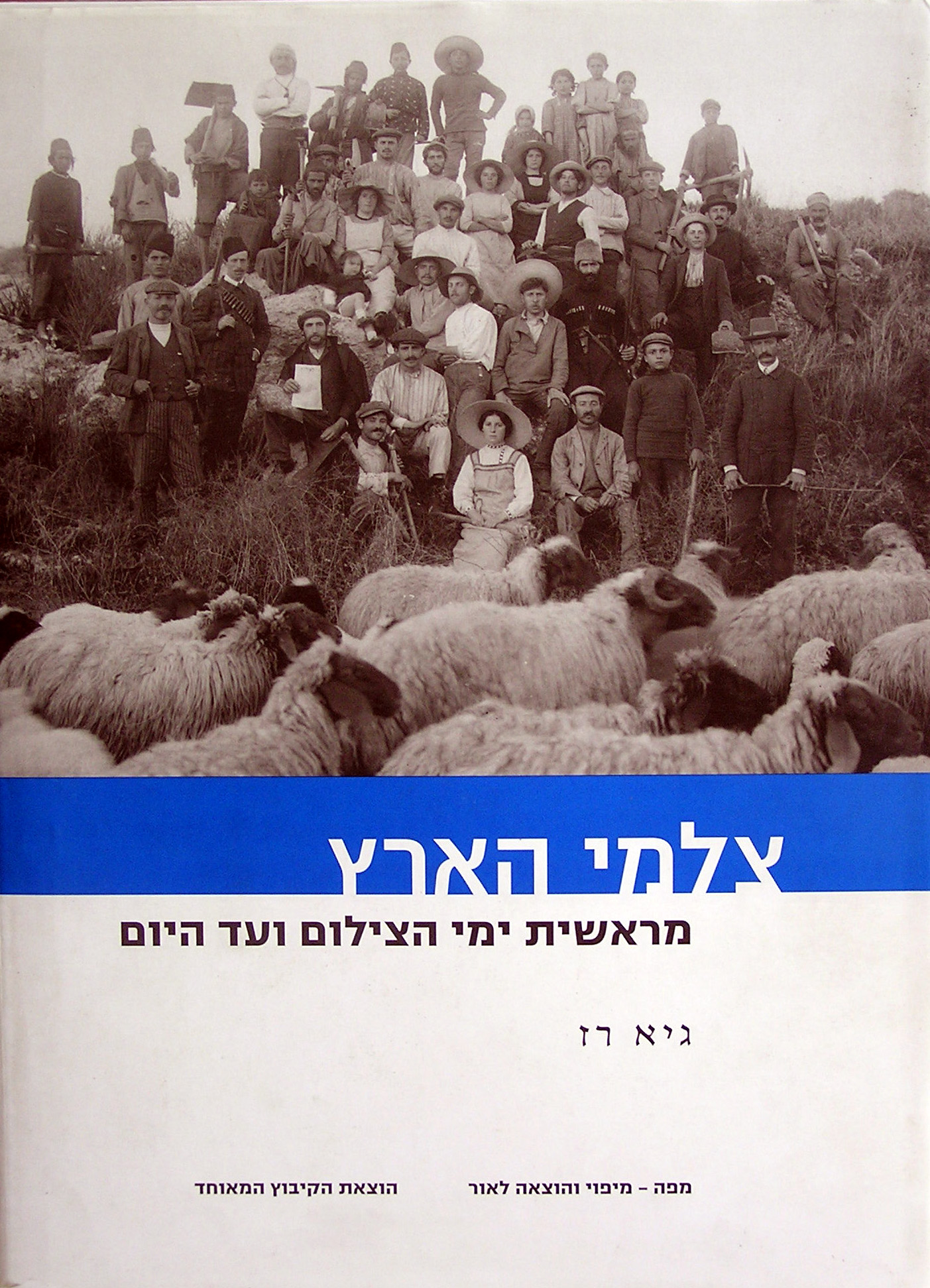 עטיפת הספר ספר צלמי הארץ - מראשית ימי הצילום ועד היום של גיא רז. שהודפס בשנת 2003 הצילום על גבי העטיפה של האיכרים הוא של אברהם סוסקין, בן שמן 1917, מקור ארכיון מכון לבון